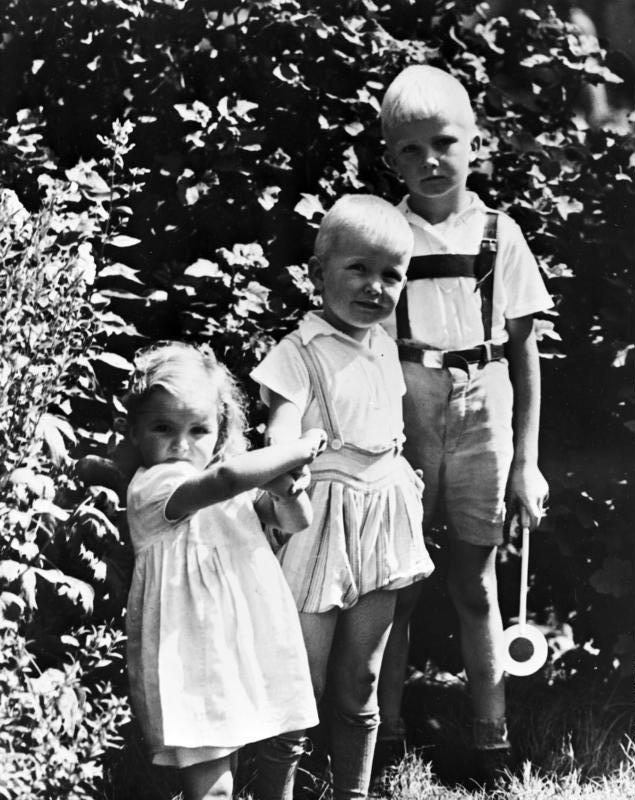 Blonde Kinder Verschiedene Porträtaufnahmen von Charakterköpfen, gesammelt im Rassepolitischen Amt der NSDAP [Drei stehende blonde Kinder] Information added by Wikimedia users.